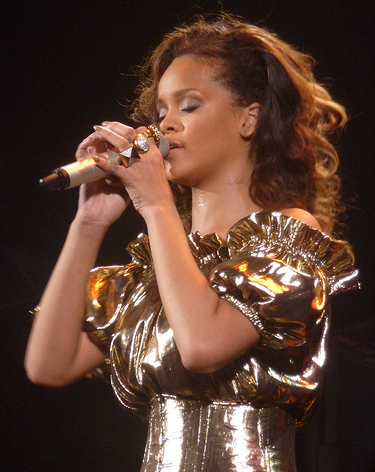 Rihanna a son concert a paris bercy